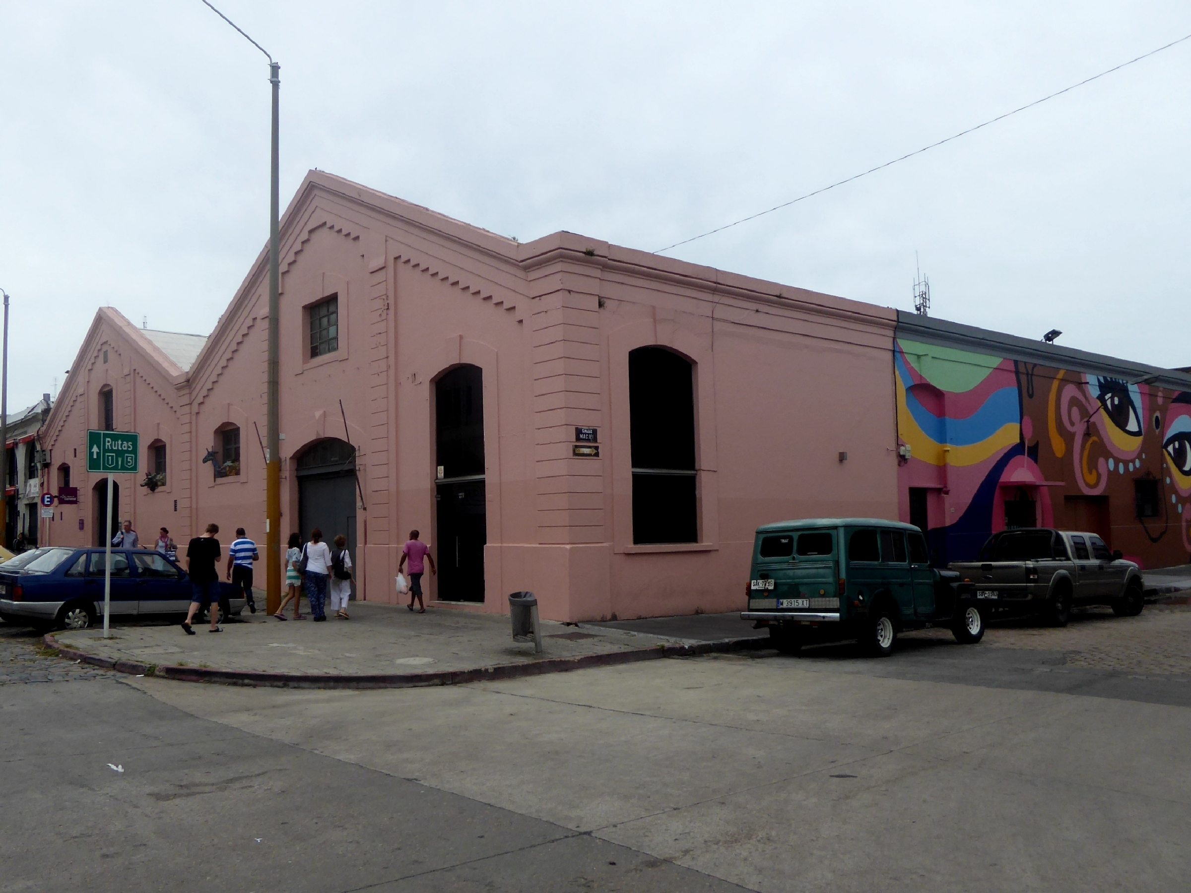 Museo del Carnaval Montevidéo Uruguay